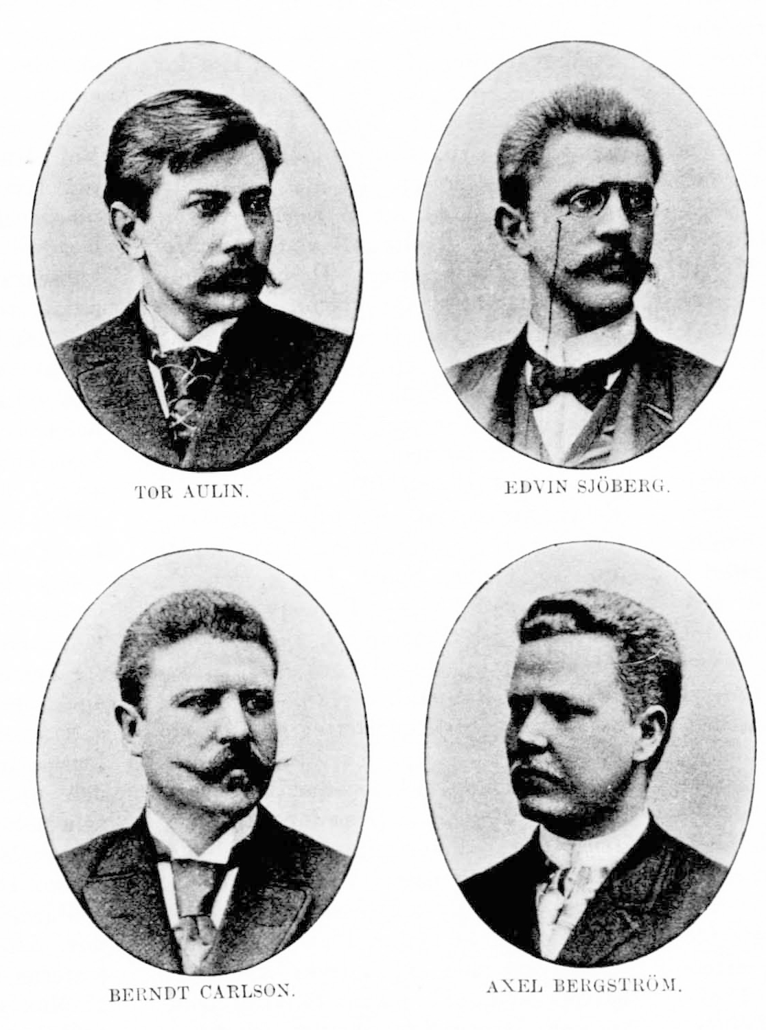 Aulin-kvartetten 1887–1903: Tor Aulin, Edvin Sjöberg, Berndt Carlson, Axel Bergström